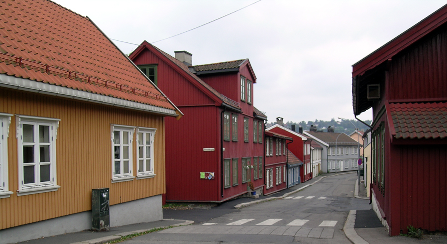 Normannsgata, Oslo.